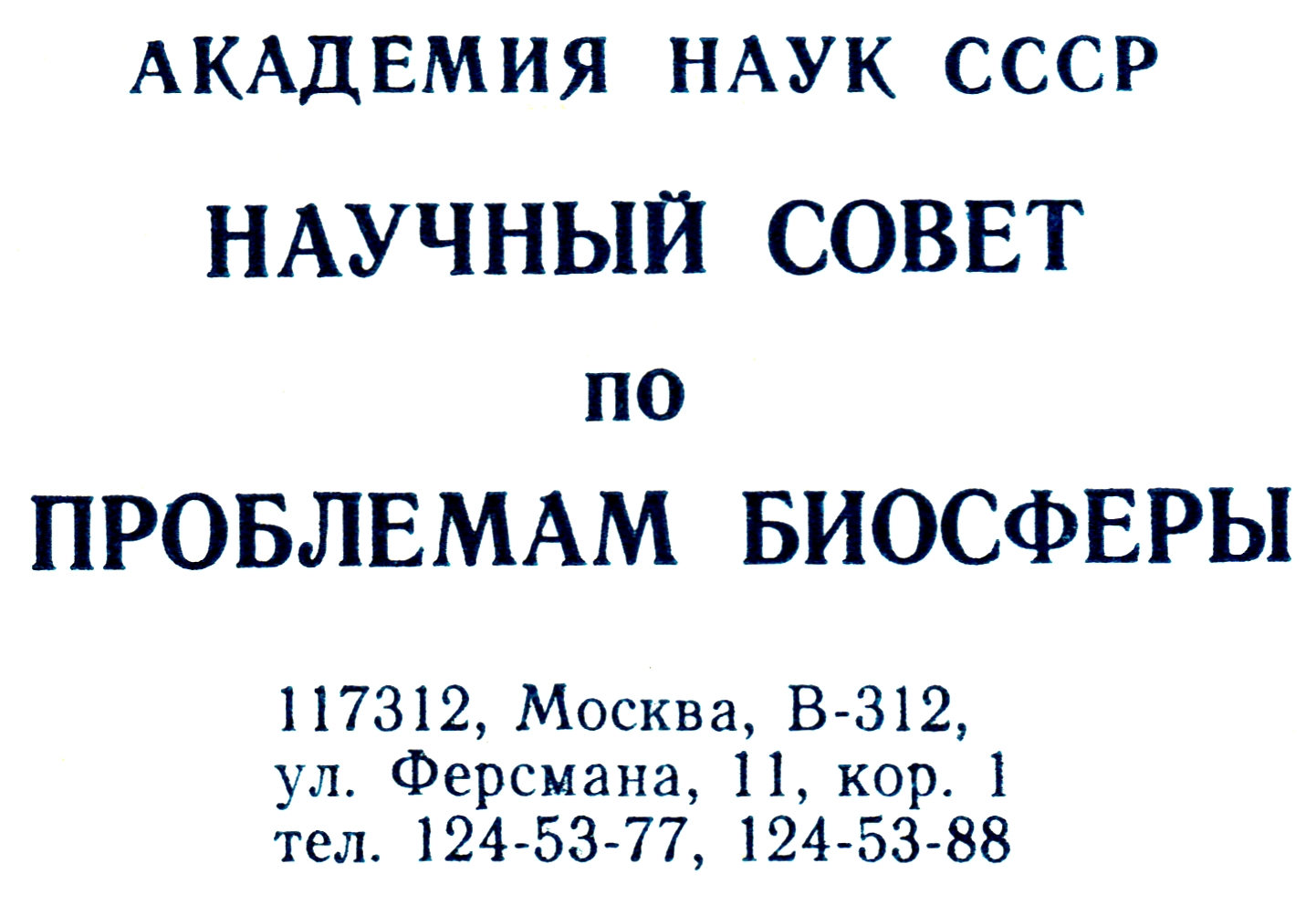 Бланк АН СССР: "Научный совет по проблемам биосферы"